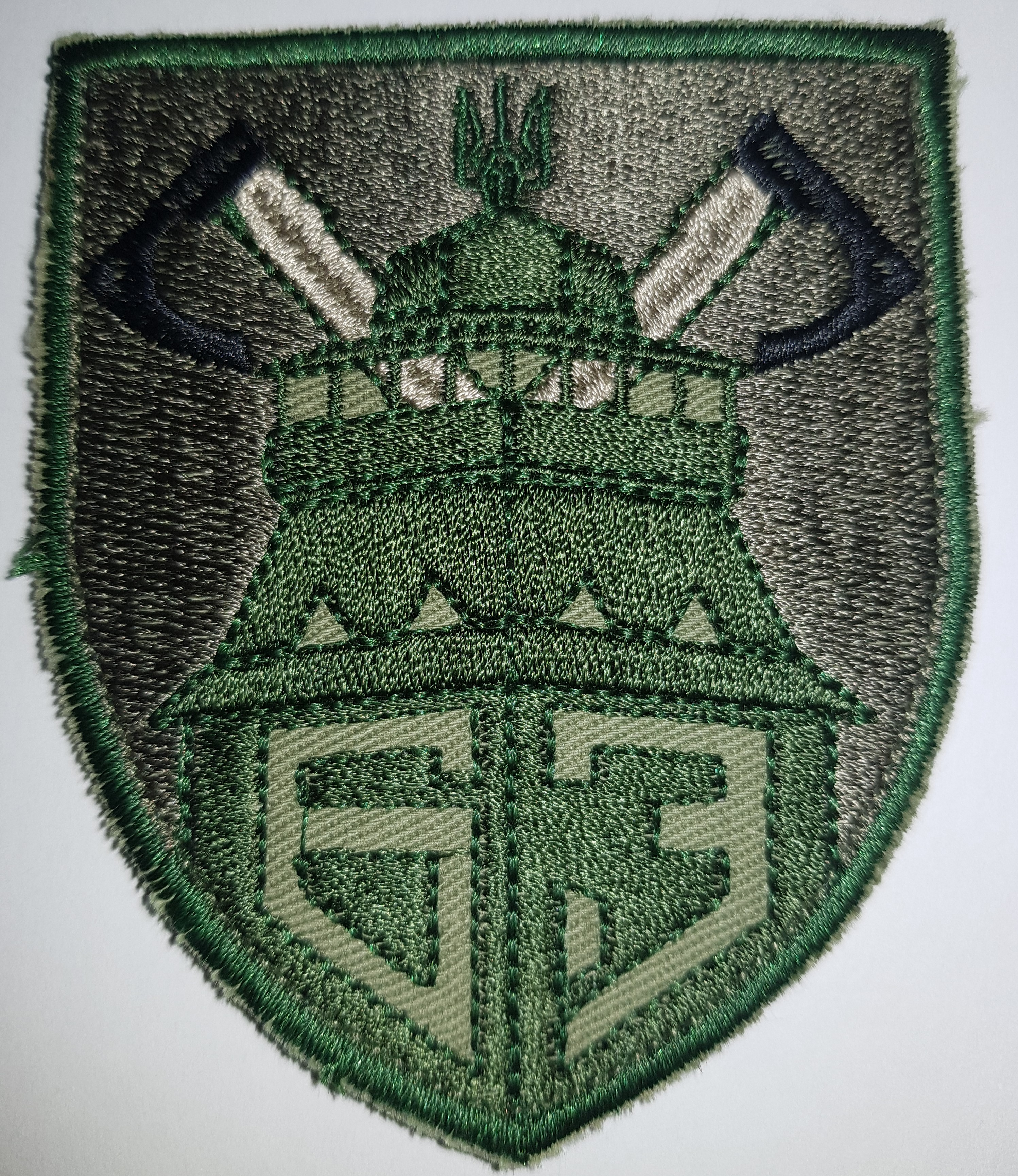 Нарукавний знак 63 омбр